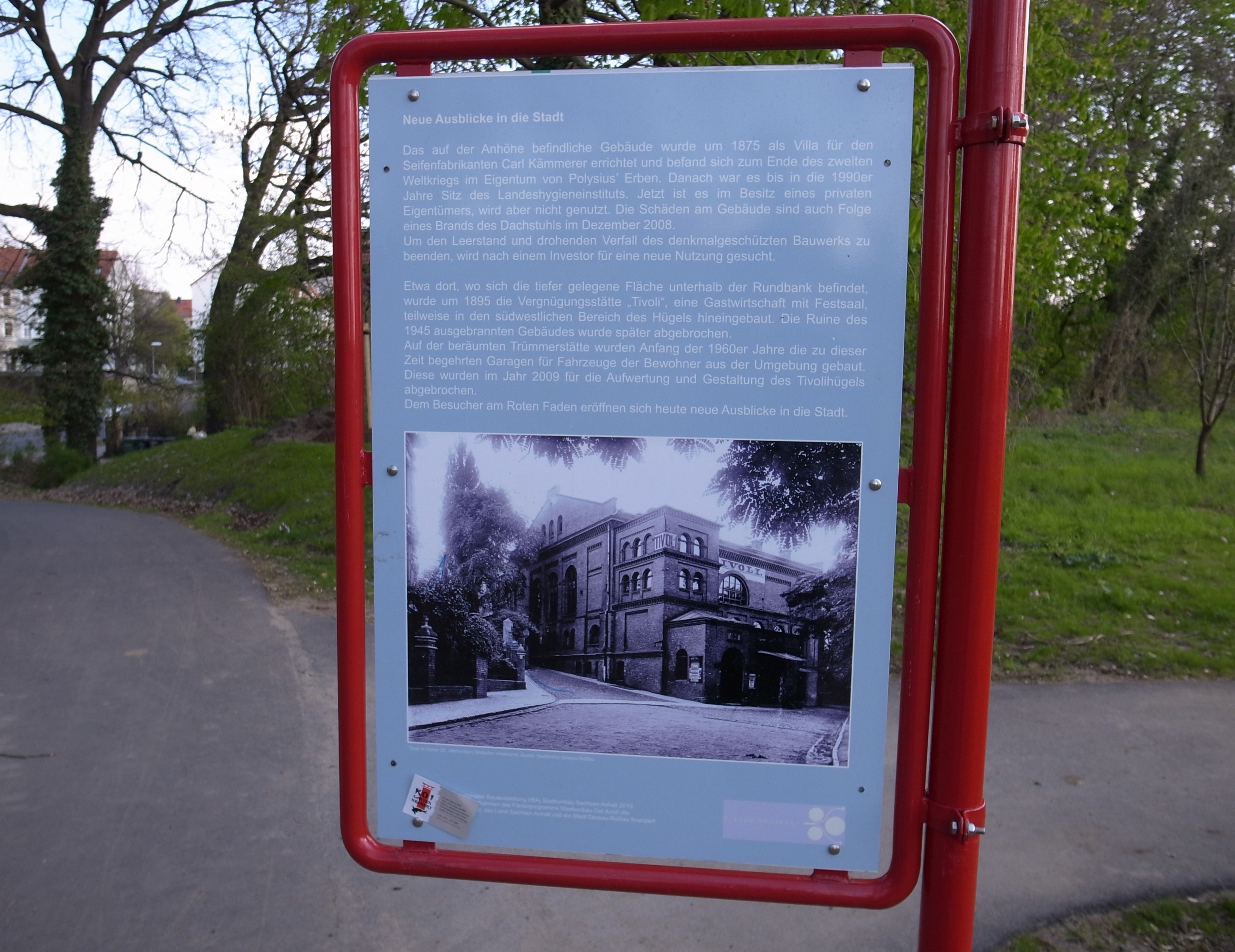 Informationstafel von der Stadt Dessau-Roßlau am Tivolihügel. Die Tafel ist inzwischen Opfer von Vandalismus geworden. Informationen zum Gebäude und dem Projekt Roter Faden stehen auf der Homepage der Stadt Dessau-Roßlau[1].